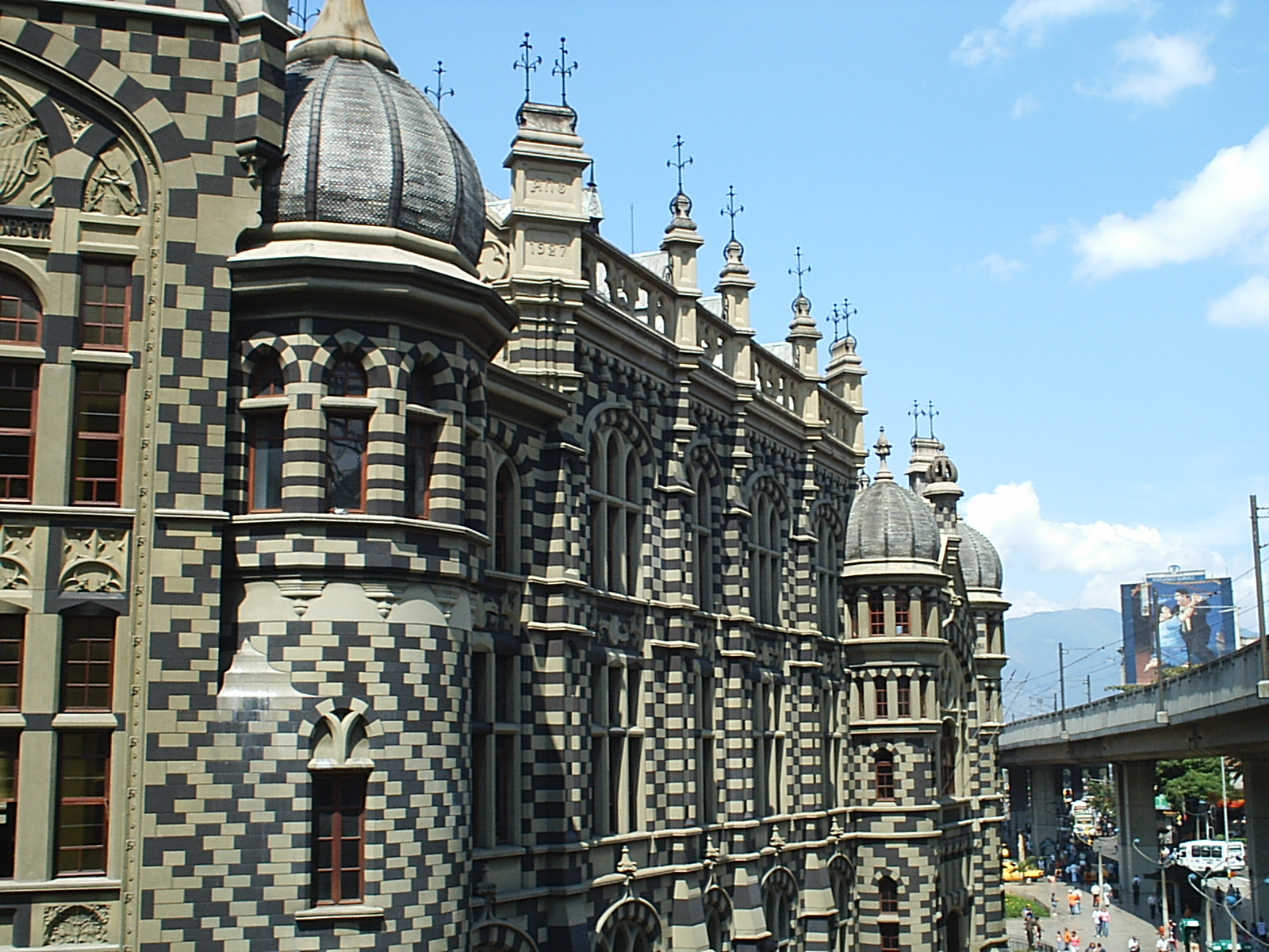 Palacio de la Cultura Rafael Uribe Uribe